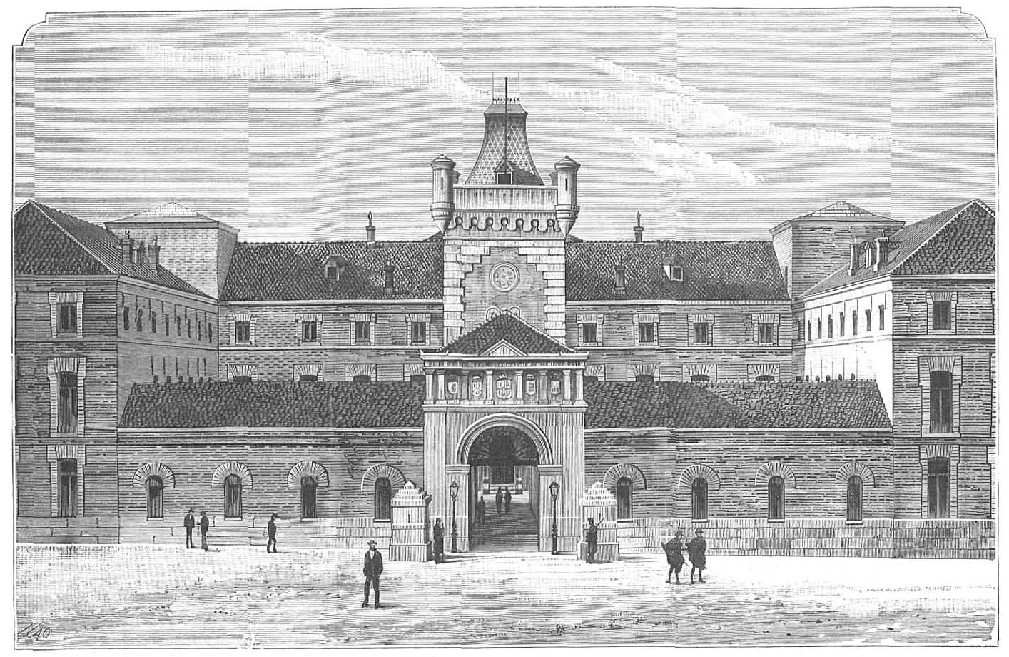 Fachada principal de la Cárcel Modelo de Madrid, en la revista española La Ilustración Española y Americana.